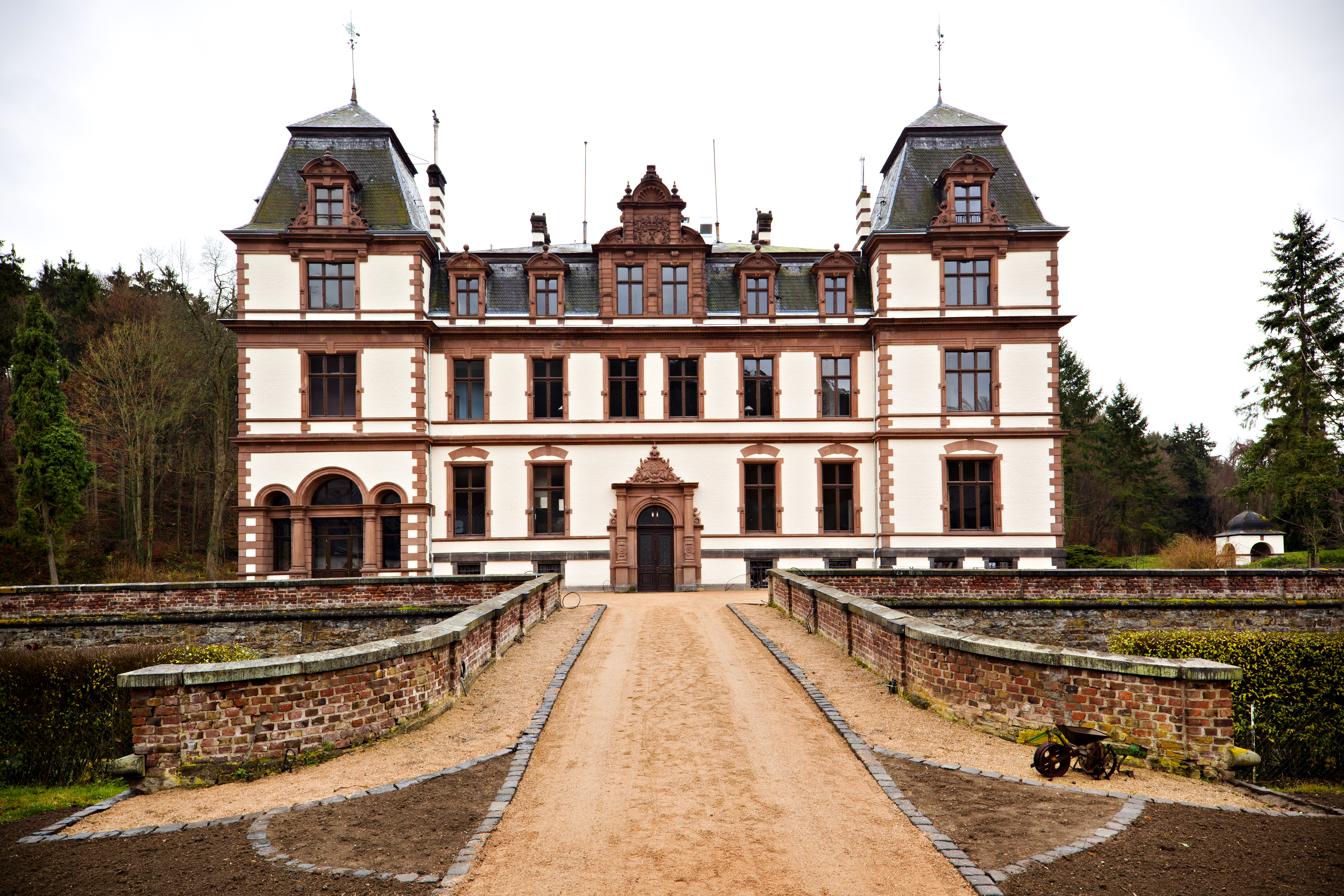 Façade du château